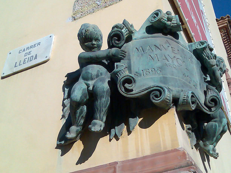 Relleu en forma de placa dedicat a l'arquitecte Manuel M. Mayol. ubicat al Mercat de les Flors (Palau d'Agricultura), a Montjuïc (Barcelona, Spain)